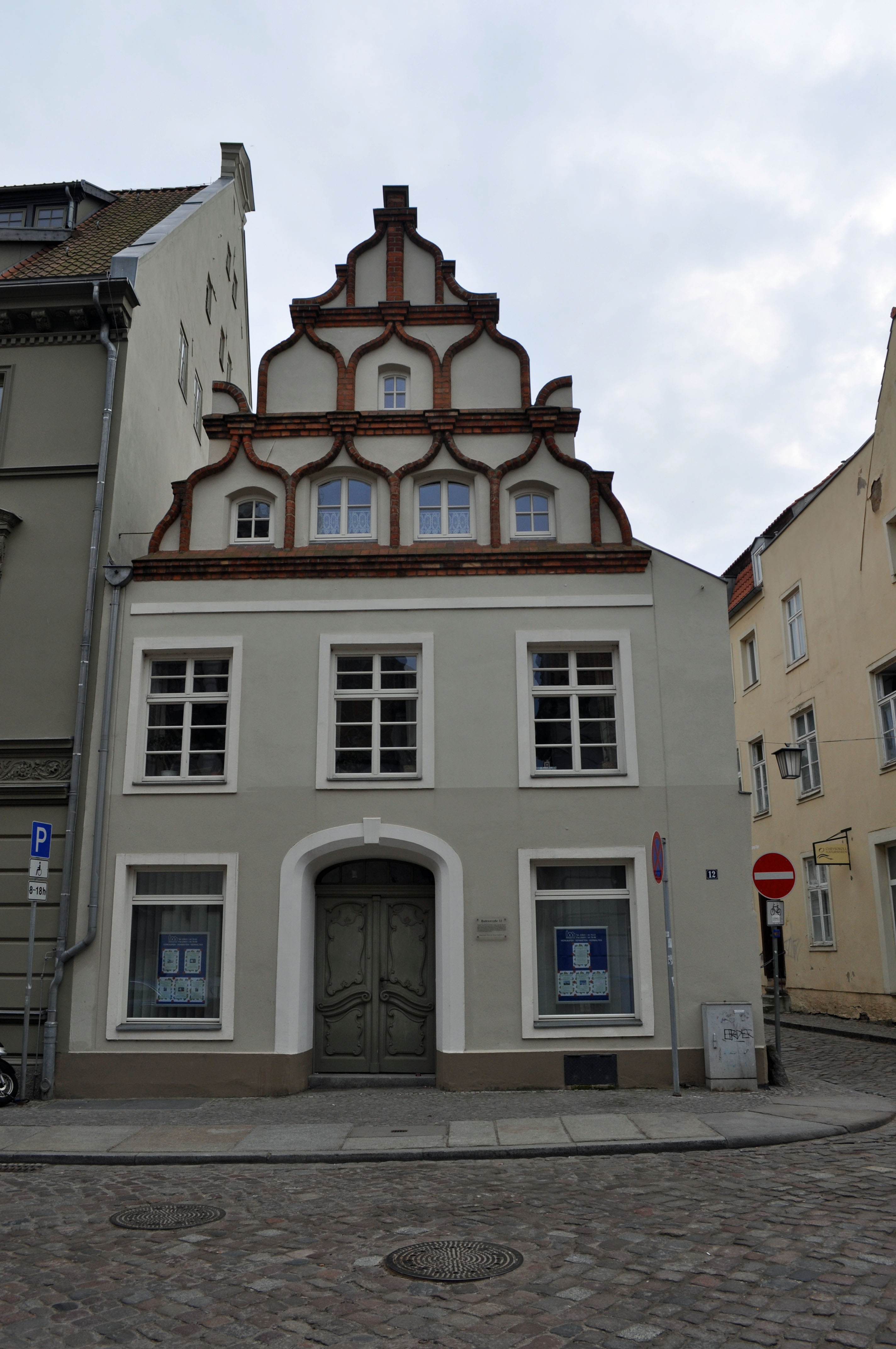 Gebäude bzw. Gebäudedetail in Stralsund. Straße und Hausnummer siehe Dateiname.